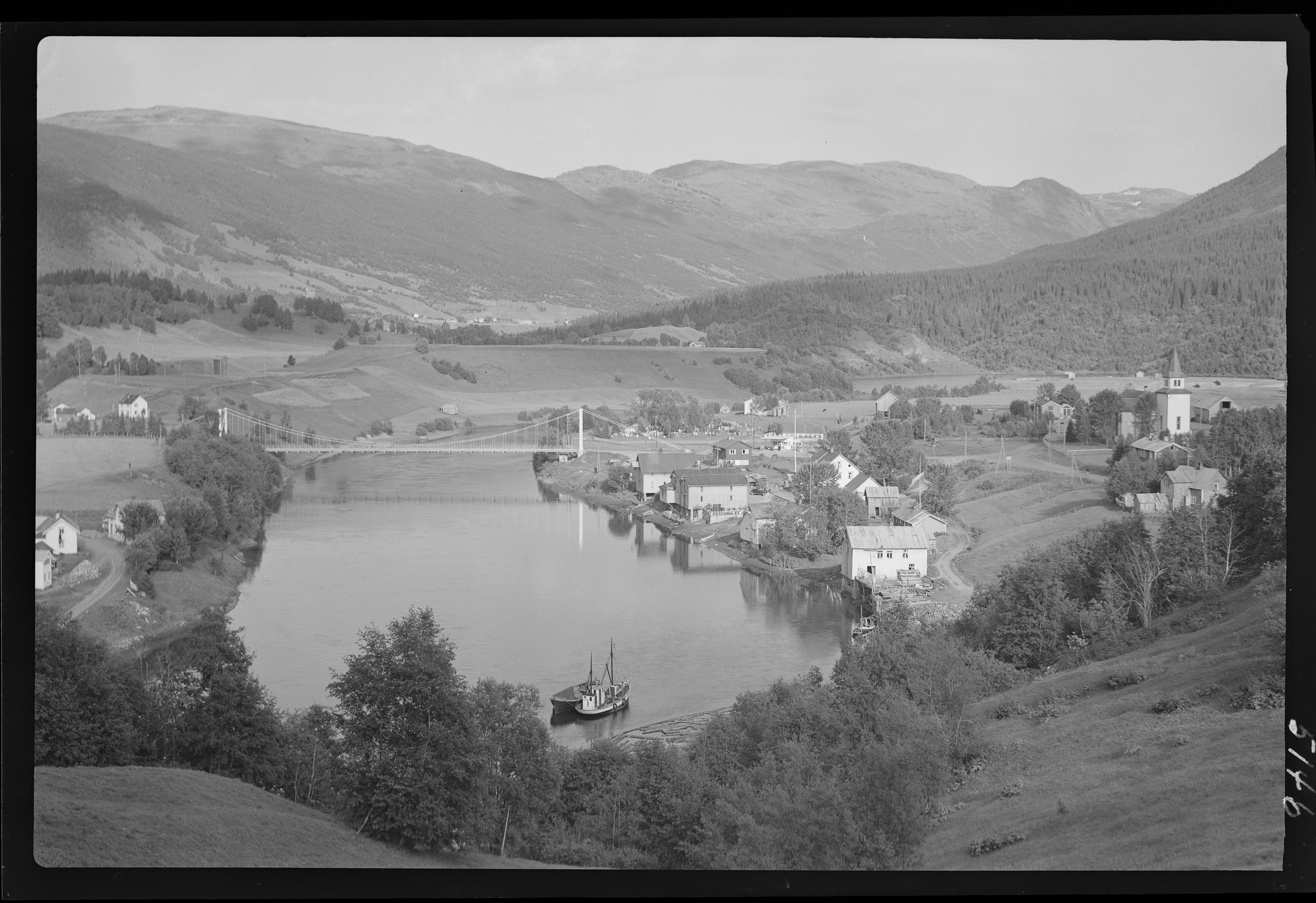 Bildet er hentet fra Nasjonalbibliotekets bildesamling. Anmerkninger til bildet var: Fotograf : ukjent Korgen,Røssåga, Hemnes, Nordland